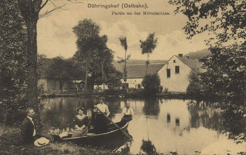 Bogdaniec - młyn (pocztówka z przełomu XIX i XX wieku)